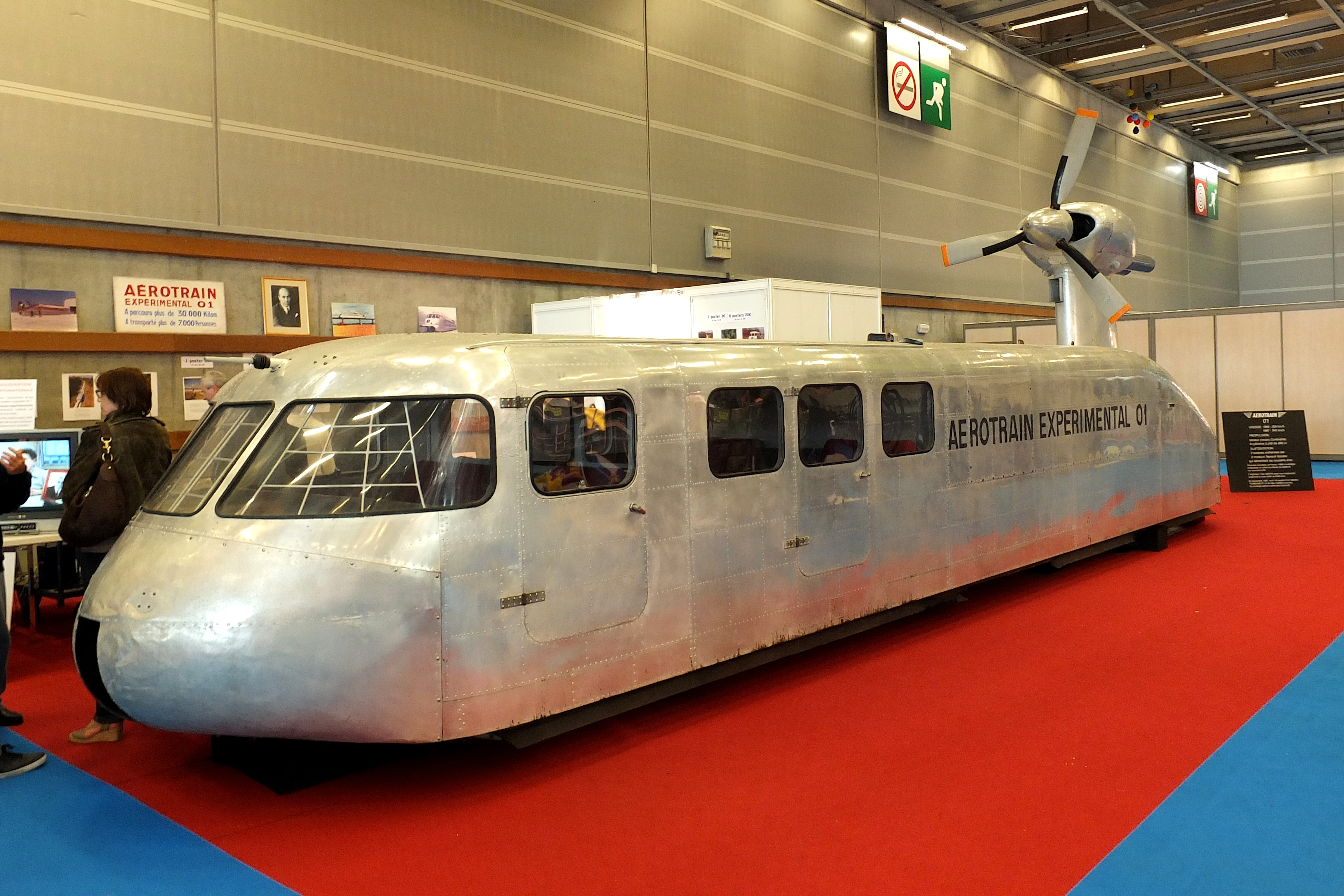 Premier prototype de l'Aérotrain Bertin, exposé à la Foire de Paris en 2013.